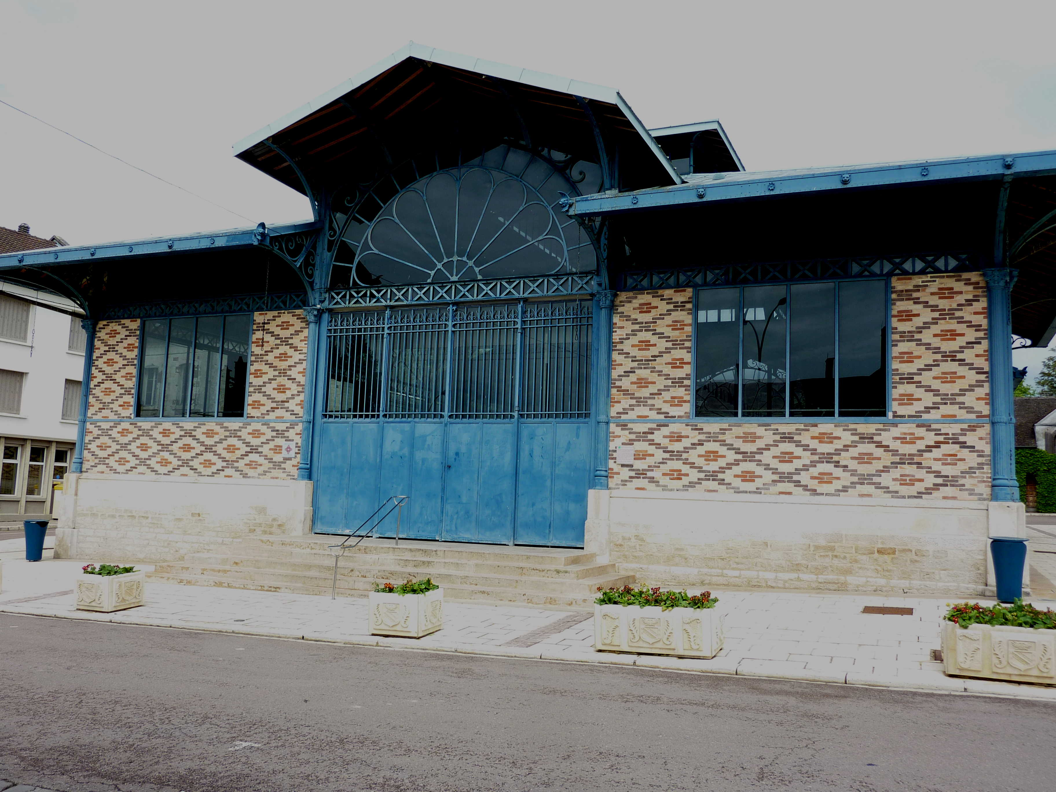 Markthalle (Marché couvert) in Aix-en-Othe im Département Aube (Champagne-Ardenne/Frankreich)